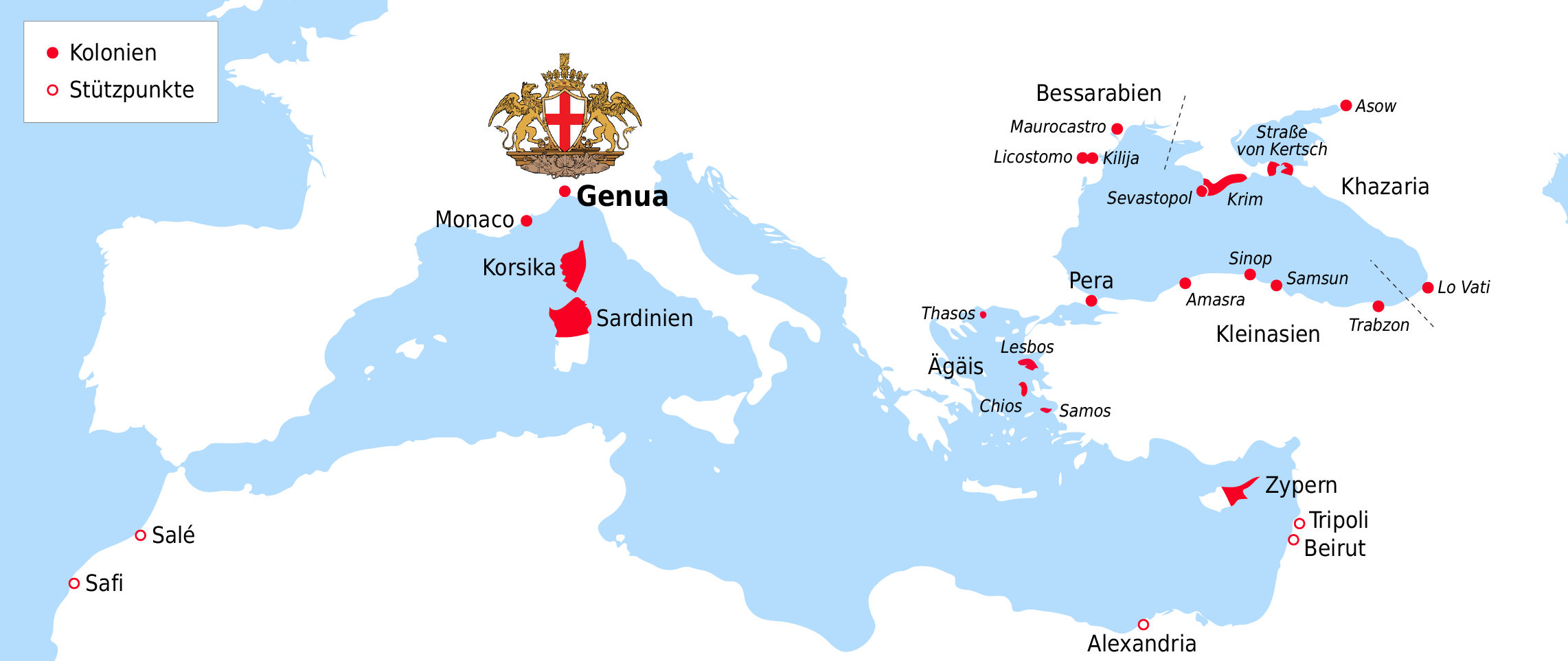 Karte der Genueser Kolonien